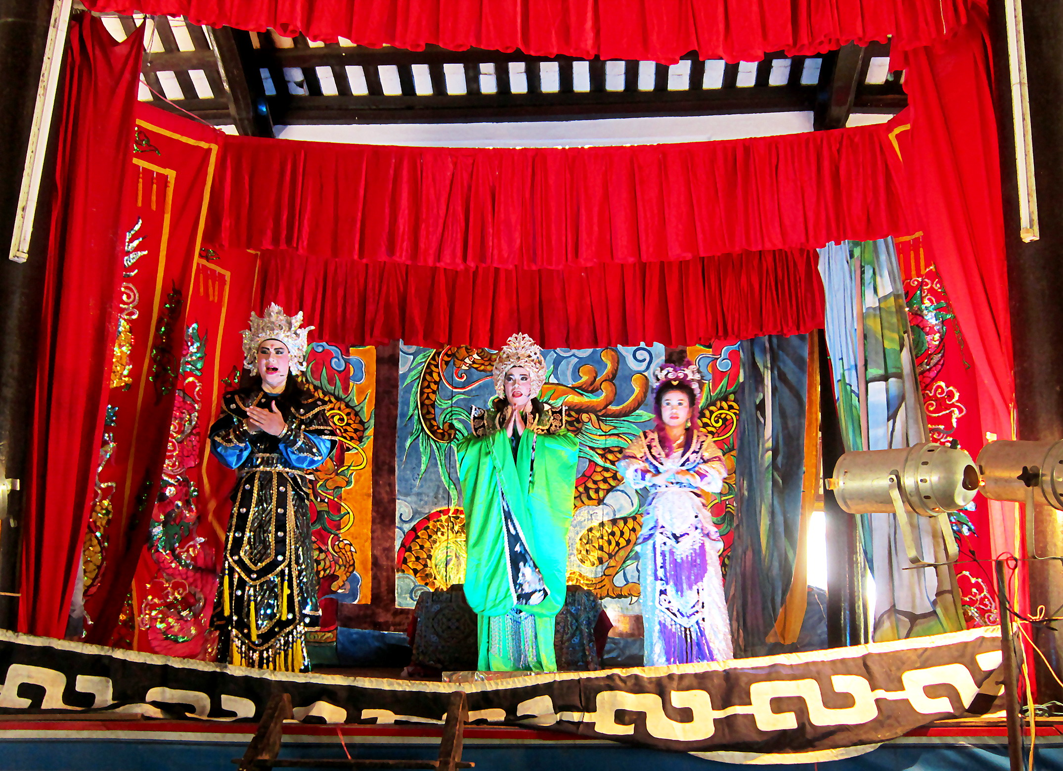 Hát tuồng trong lễ Kỳ Yên tại đình Mỹ Phước (Long Xuyên) năm 2014